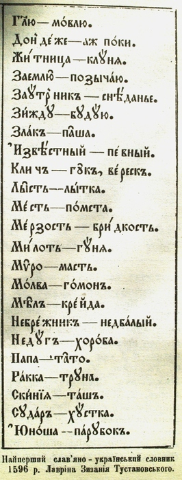 Примеры переводов из первого словаря Лаврентия Зизании Тустановского 1596 г. «Лексис, Сирѣчь реченїя, Въкратъцѣ събран(ъ)ны и из слове(н)скаго языка на просты(й) рускі(й) діале(к)тъ истол(ъ)кованы», изданного в Вильно в 1596 г. В левой колонке слова на церковно-славянском языке, а в правой на "простой мове", почти совпадающей с современным украинским языком